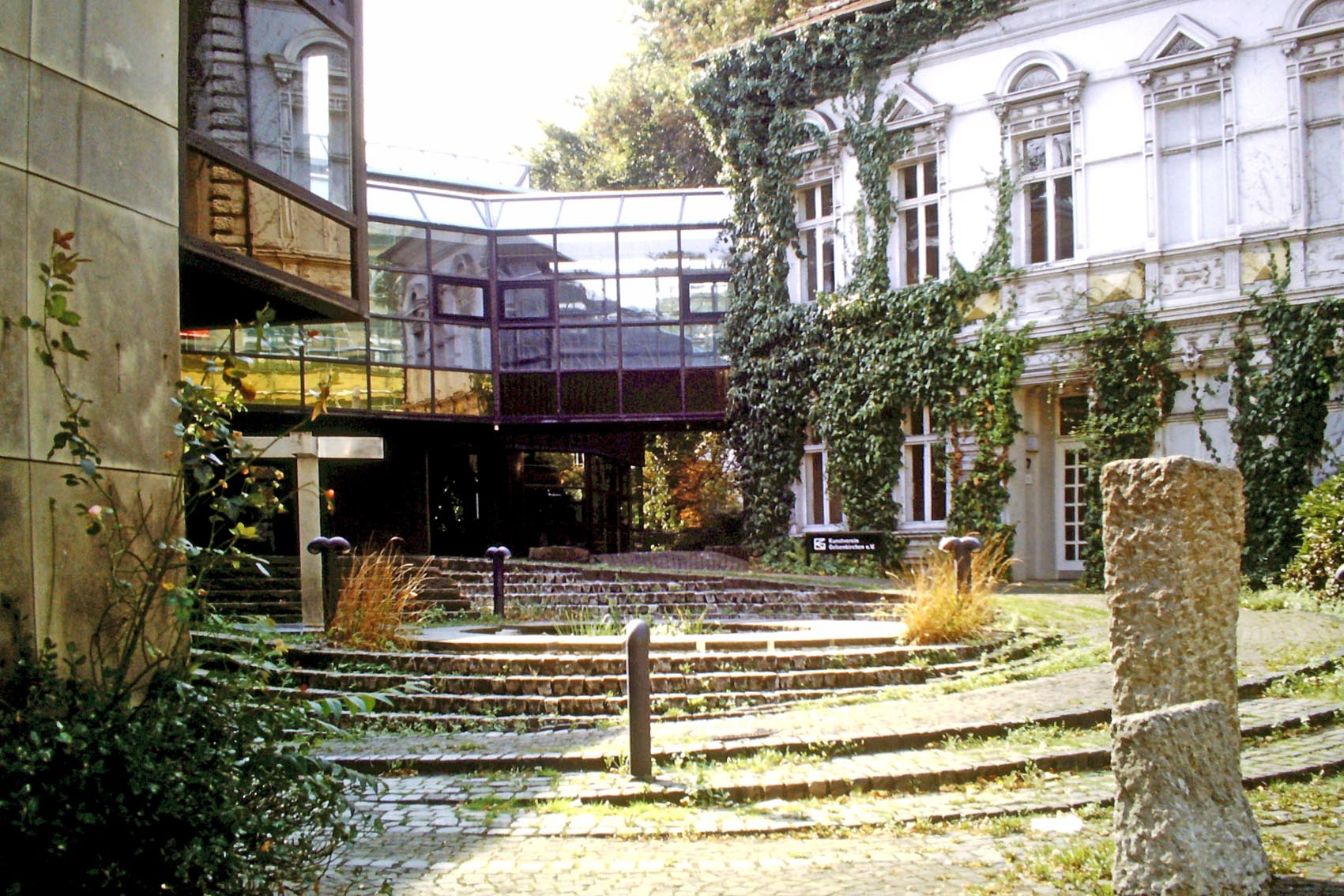 Ausstellungsort Alte Villa Kunstmuseum Gelsenkirchen